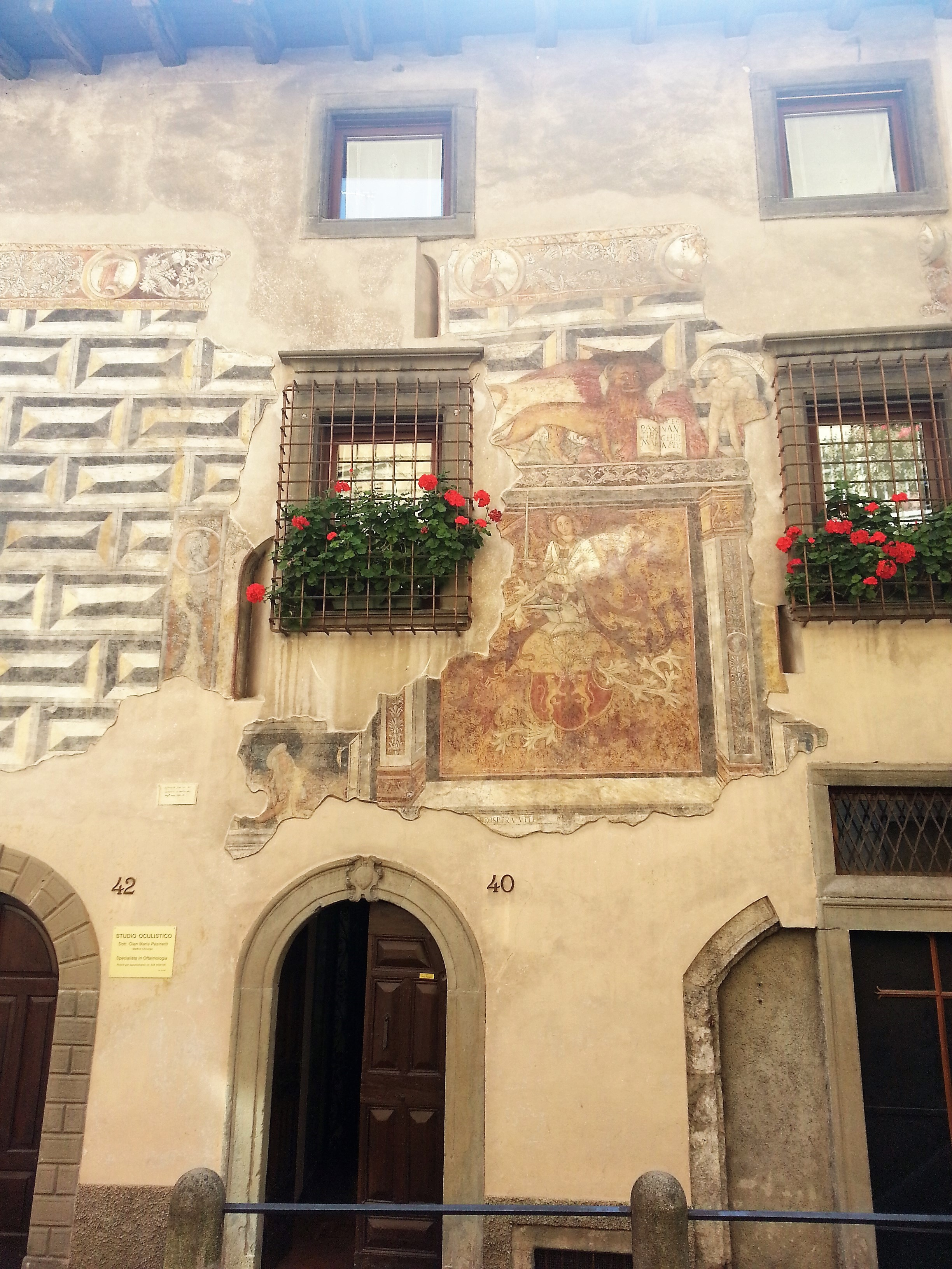 Affresco parete ad ovest del Palazzo Bonicelli della Vite di Clusone